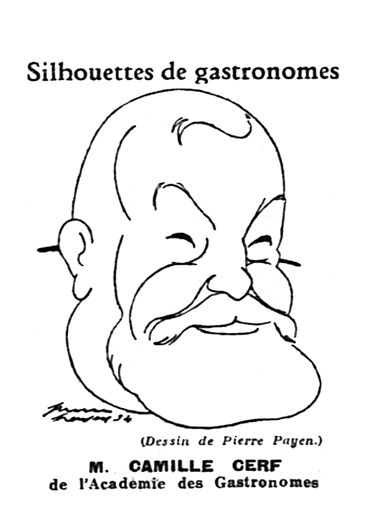 dessin de Camille Cerf, lire dans le domaine public (Pierre Payen est mort en 1944)